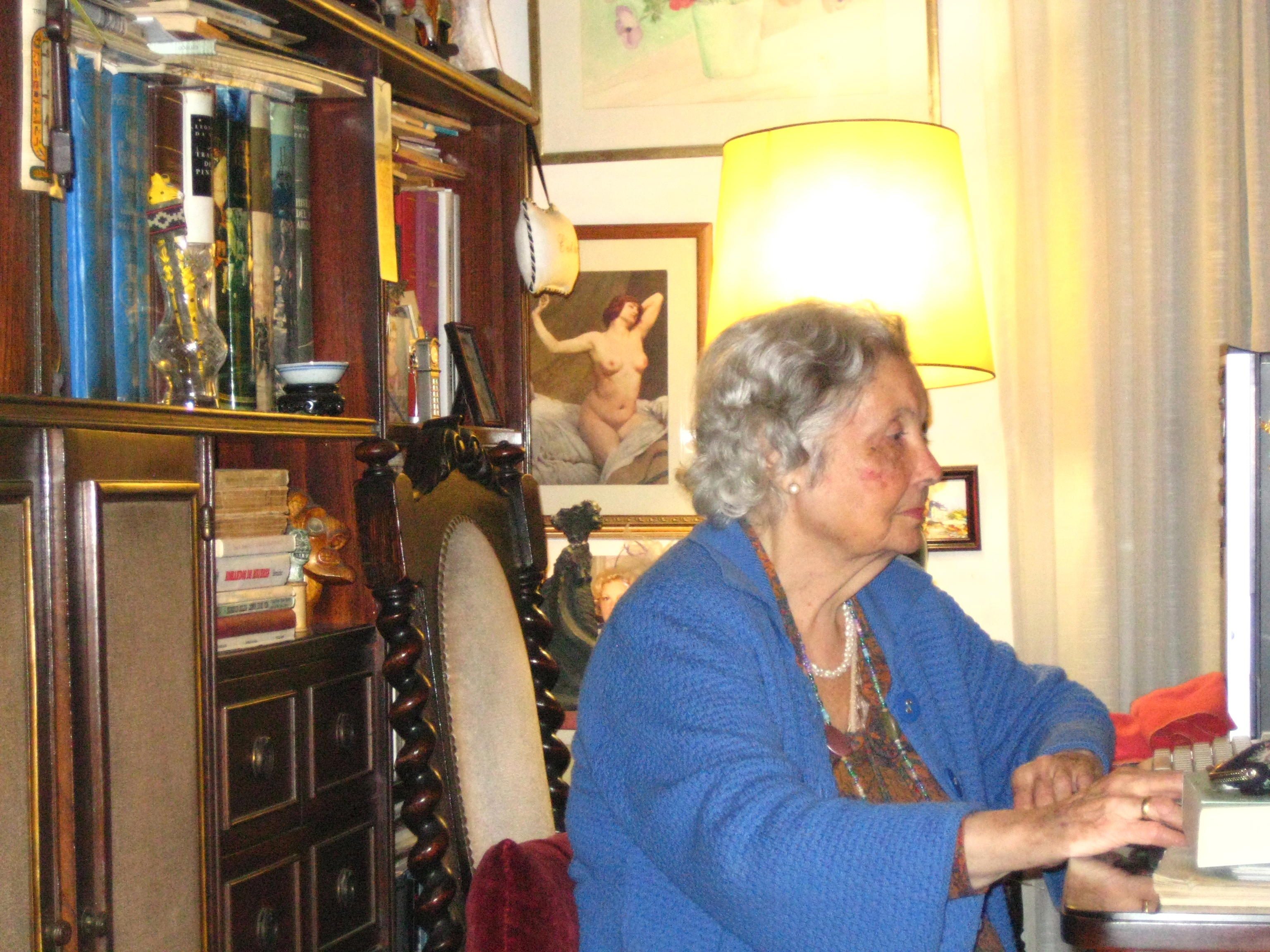 Lily Sosa de Newton en su escritorio trabajando en la computadora como siempre en sus investigaciones